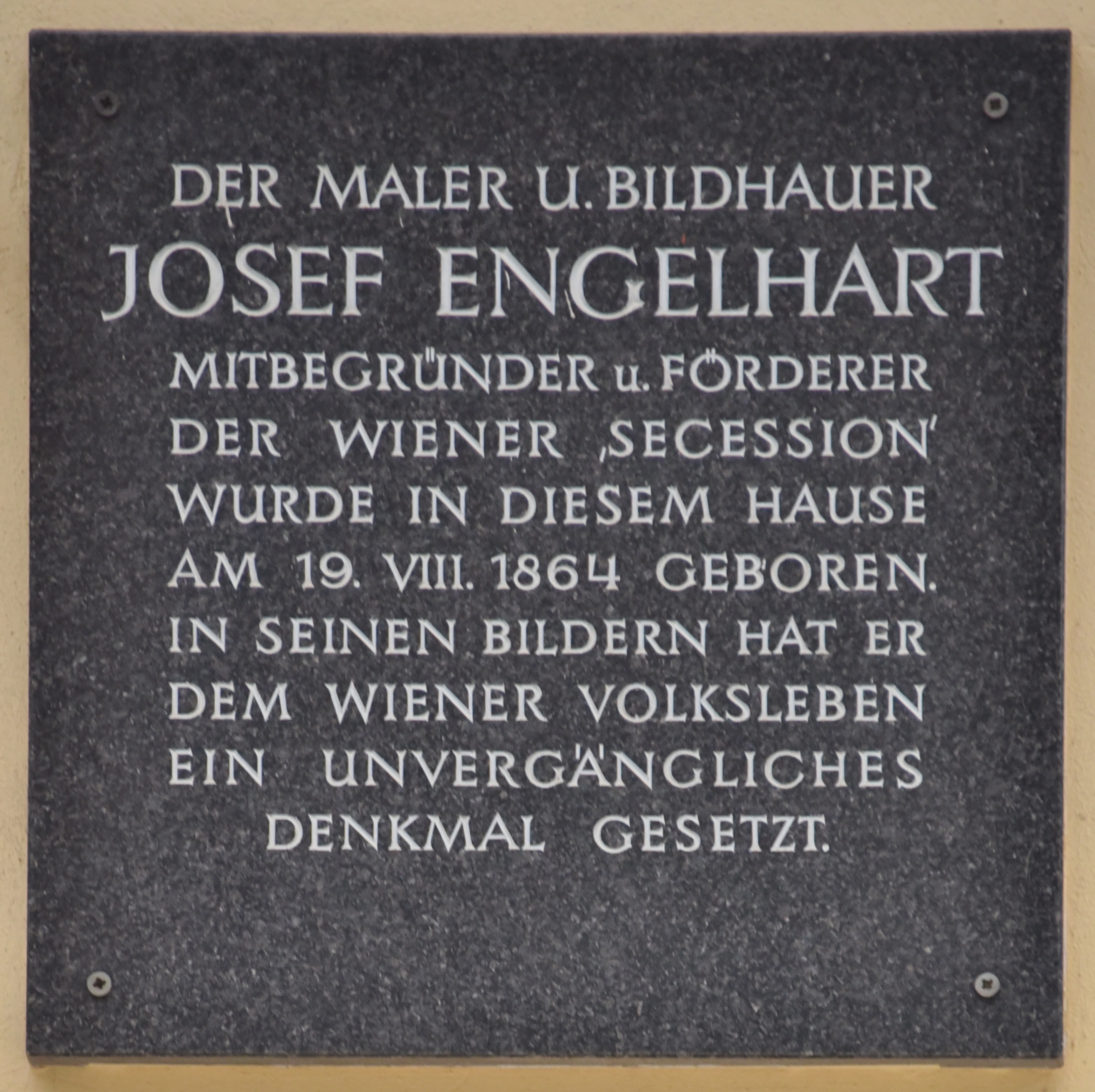 Gedenktafel Geburtshaus Josef Engelhardt, Löwengasse 19